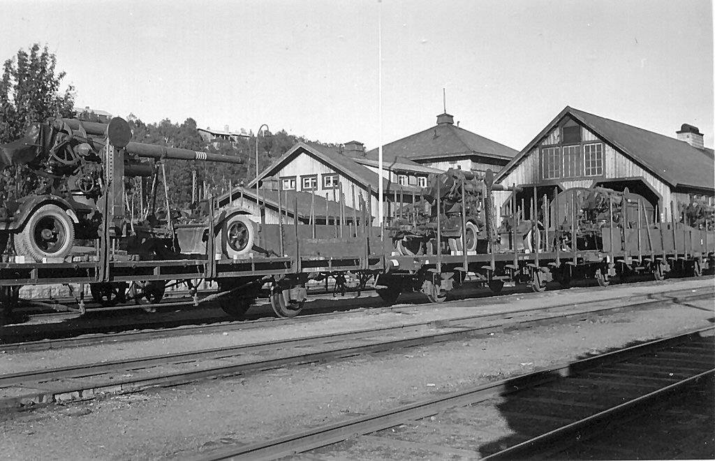 Storlien 1940, German transit traffic